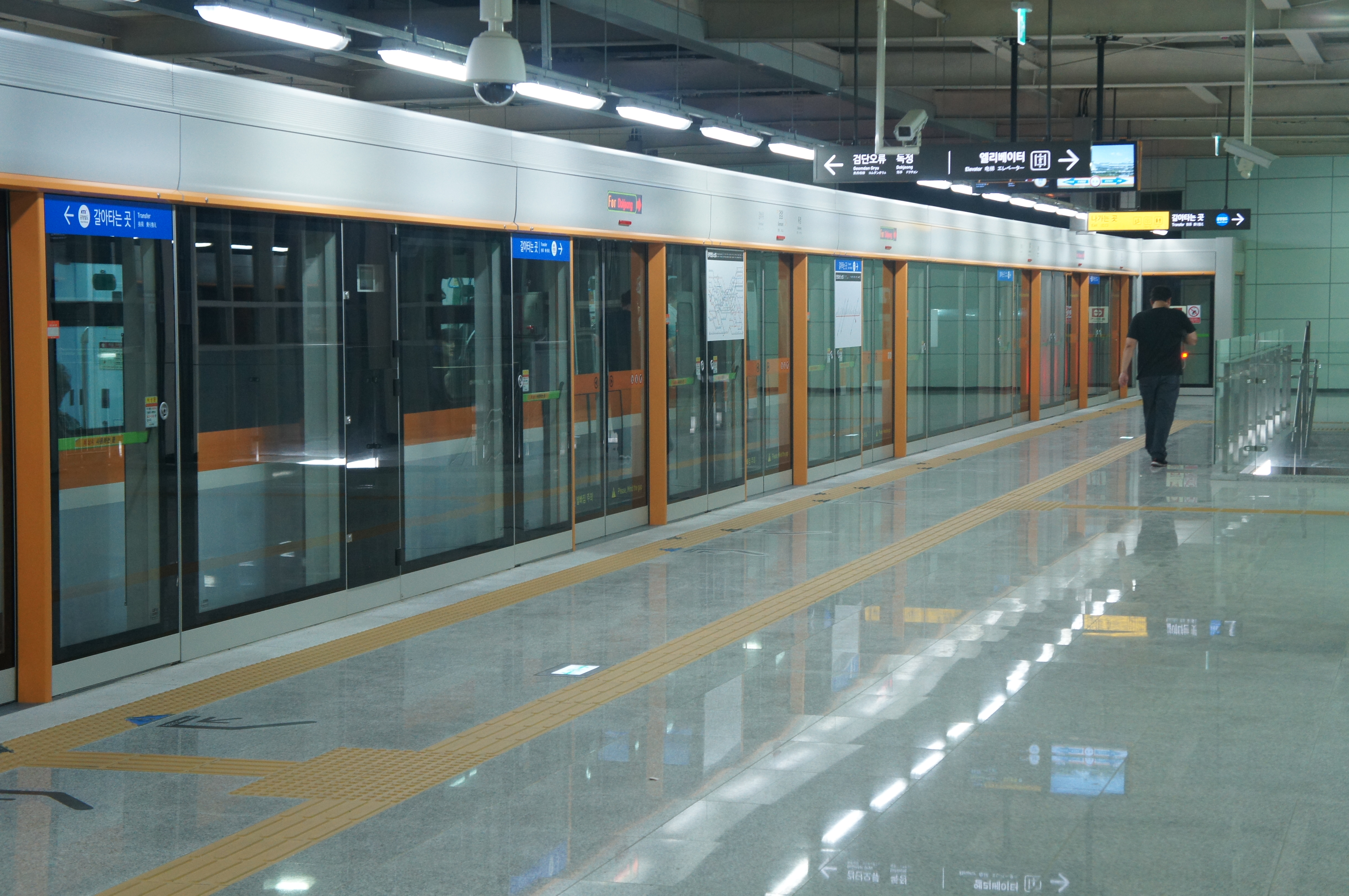 검암역 승강장